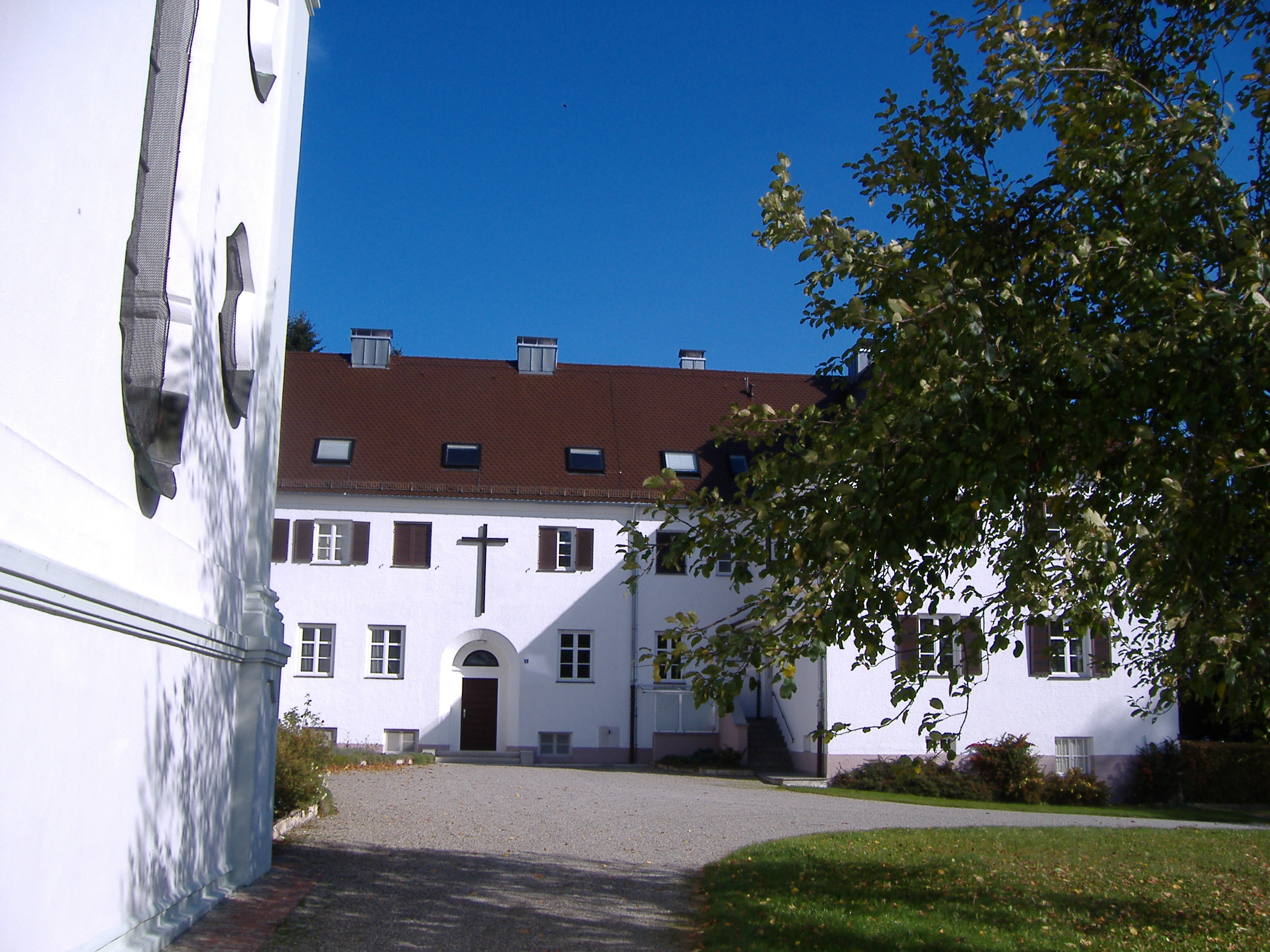 Welden